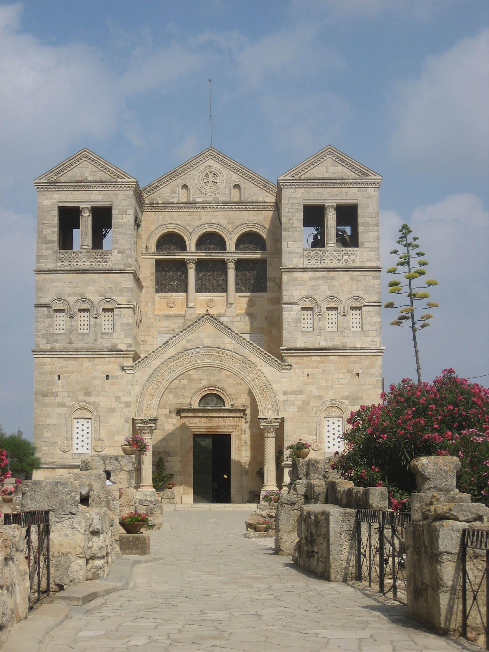 Basilique de la Transfiguration sur le mont Thabor - Terre Sainte